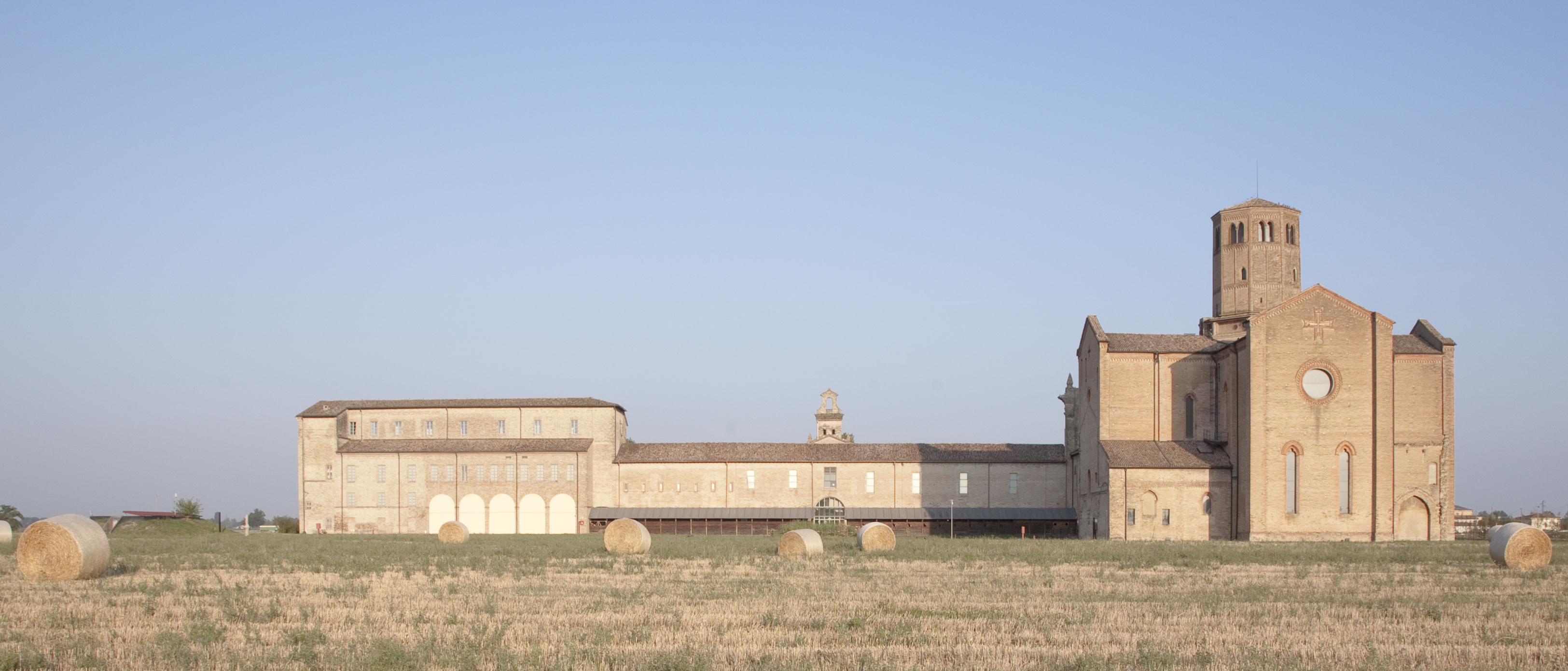 Immagine della abbazia di Paradigna